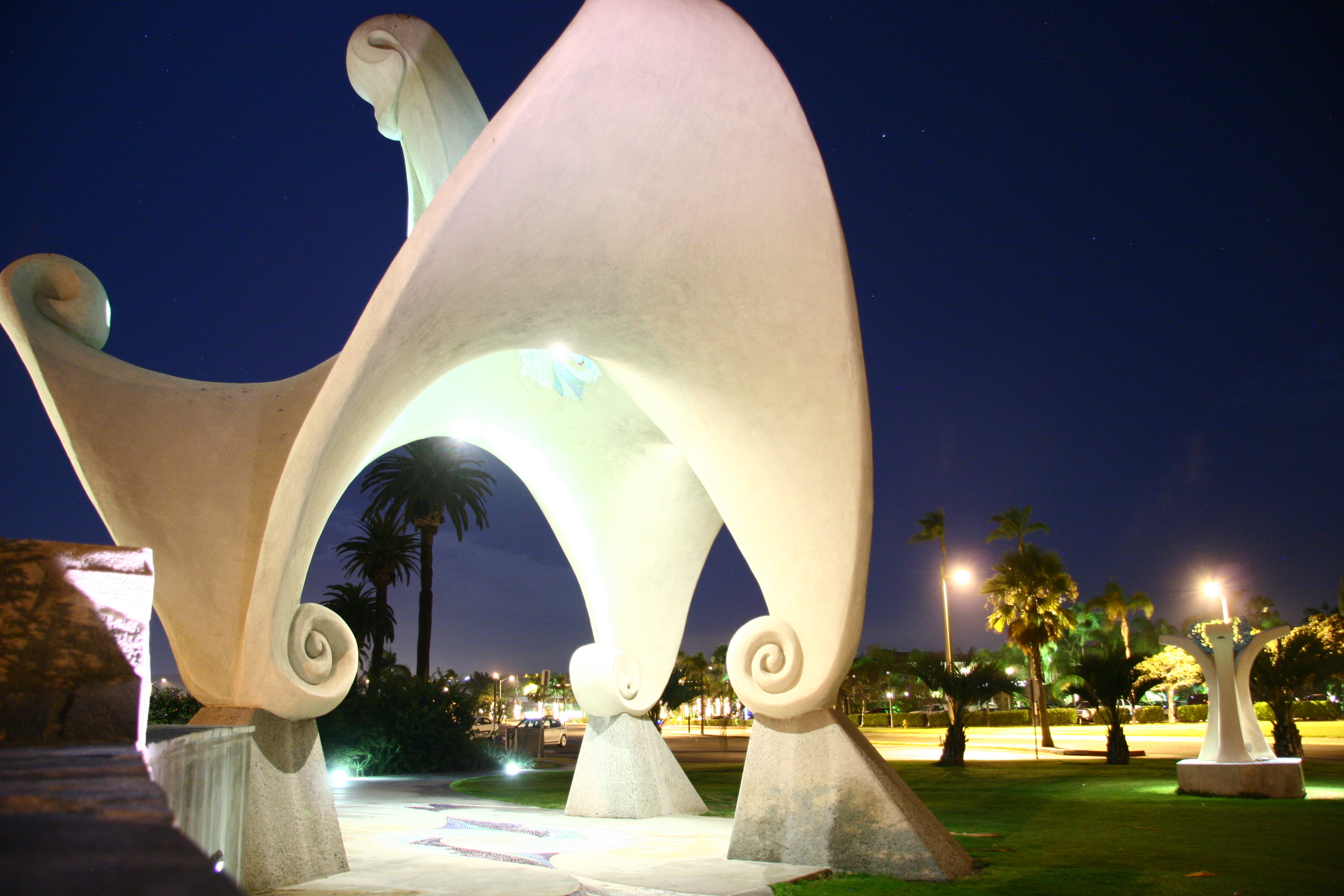 La Playa, San Diego, CA, USA